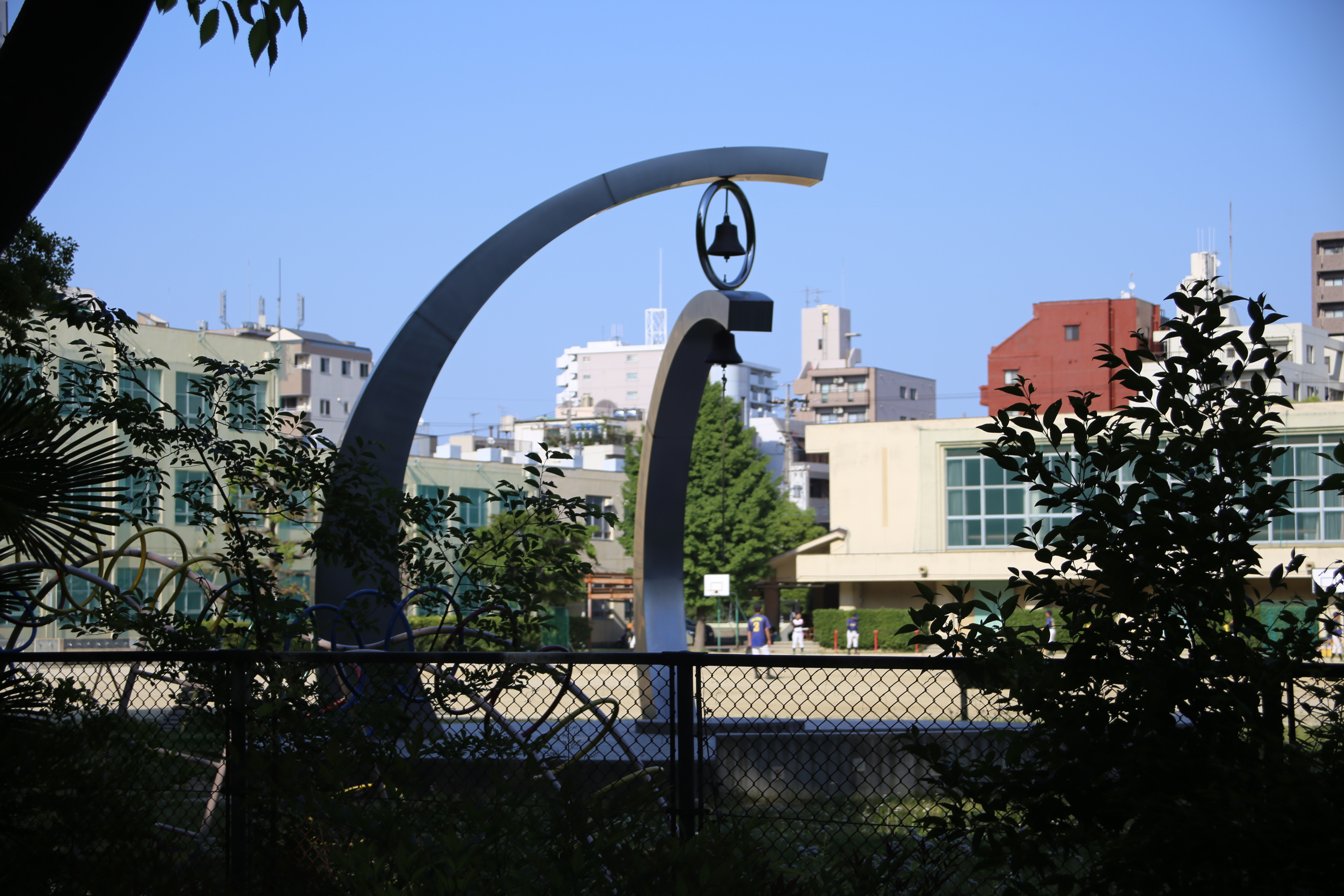 名古屋市中区平和一丁目の名古屋市立平和小学校敷地内に設置されている「ちうねチャイム」を西側に隣接する公園より撮影。